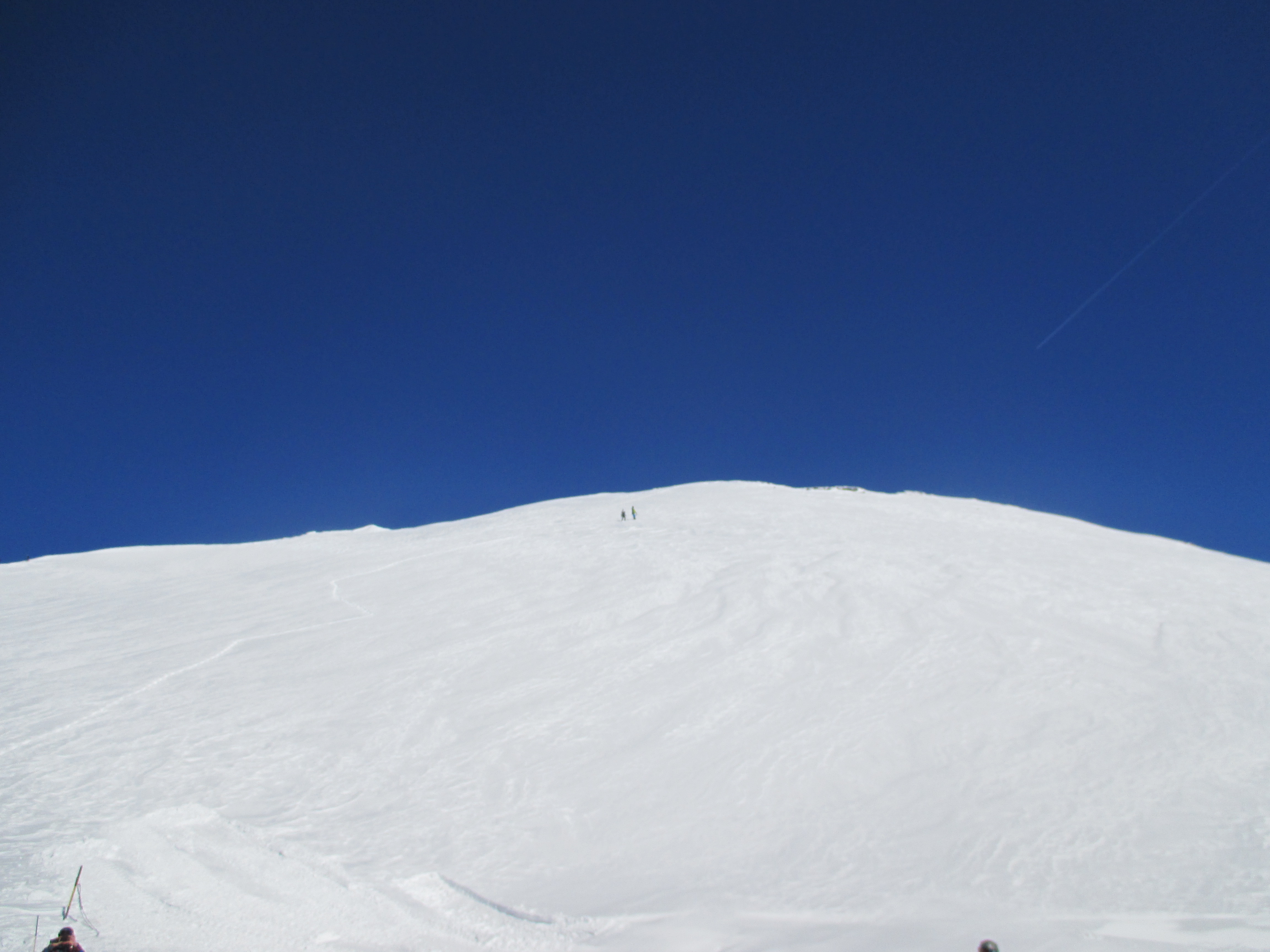 Laaxer Stöckli von Bergstation von La Siala.